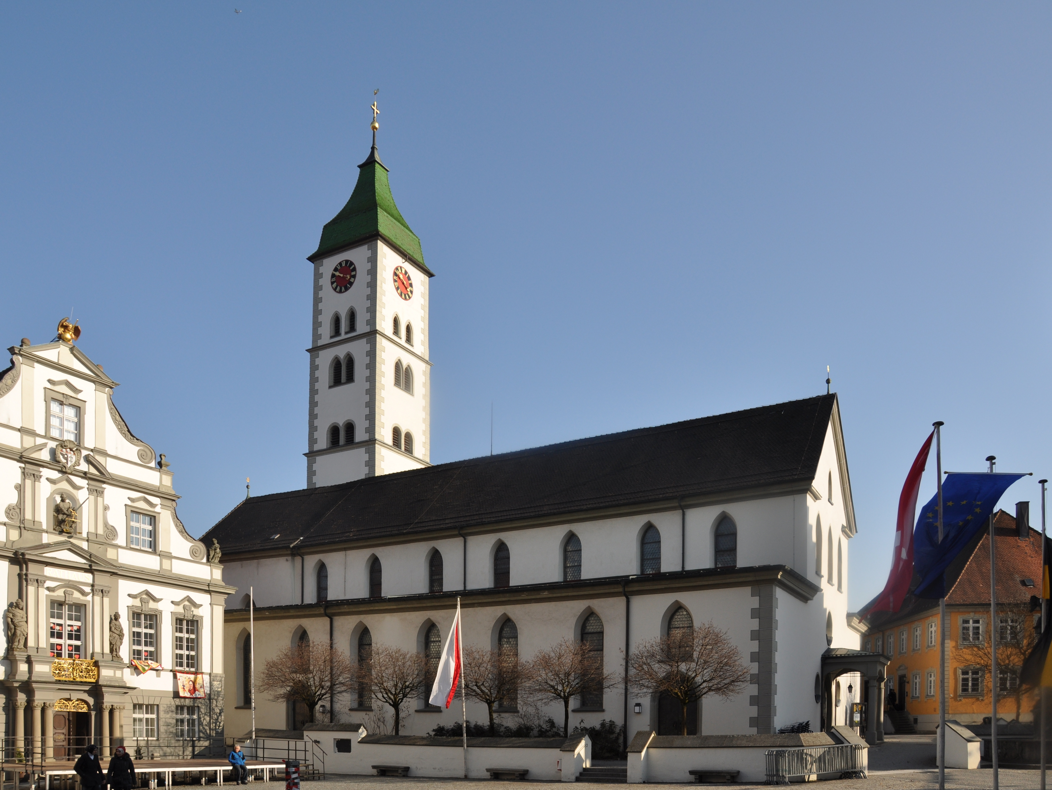 Wangen im Allgäu, Kath. Pfarrkirche St. Martinus